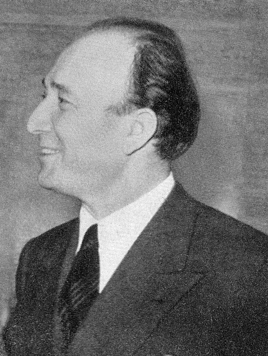 Fotoritratto dell'Ing. Gabrielli nel 1957 Licensing Categoria:Immagini di aeroplani